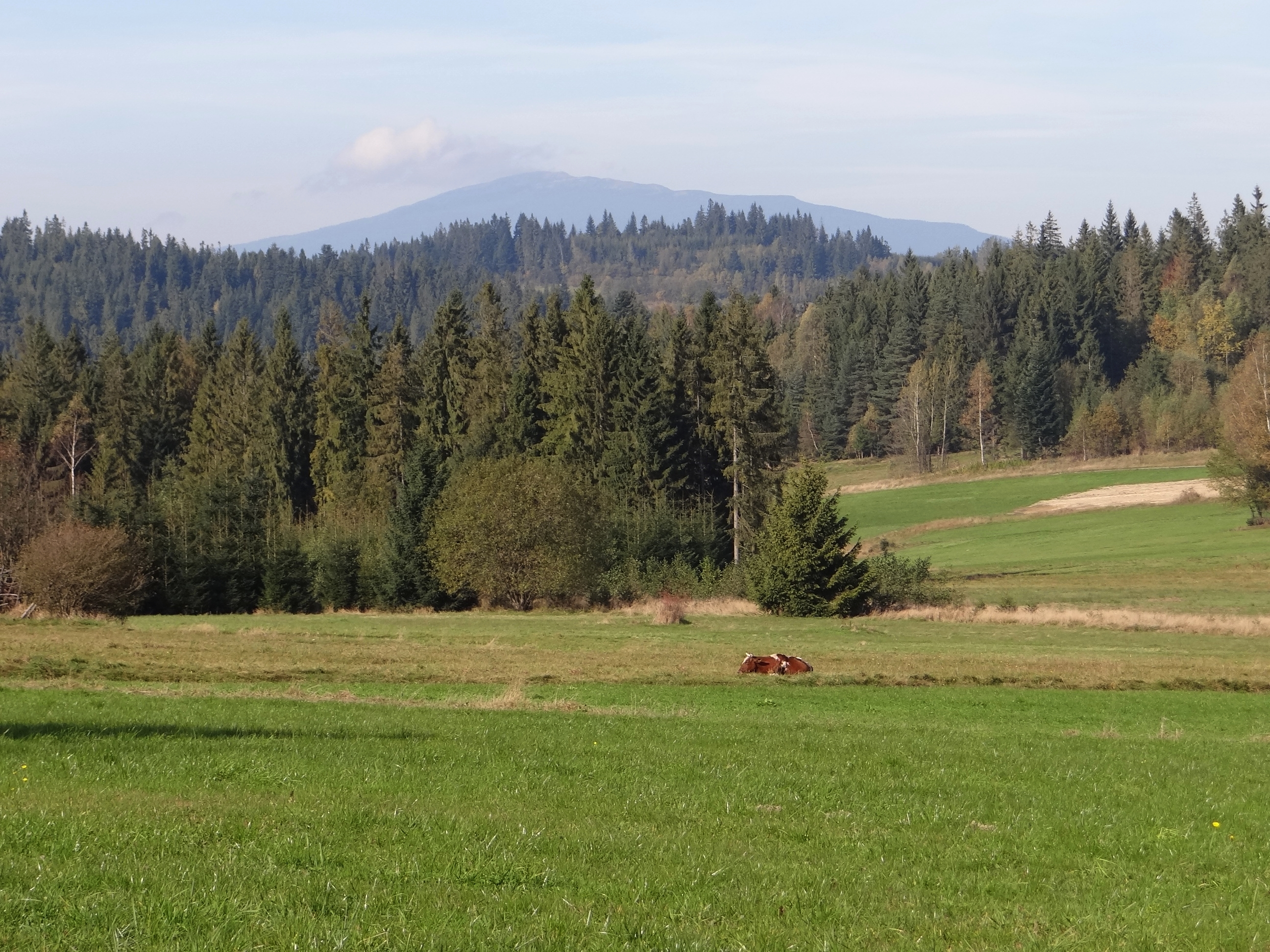 Wielki Dział